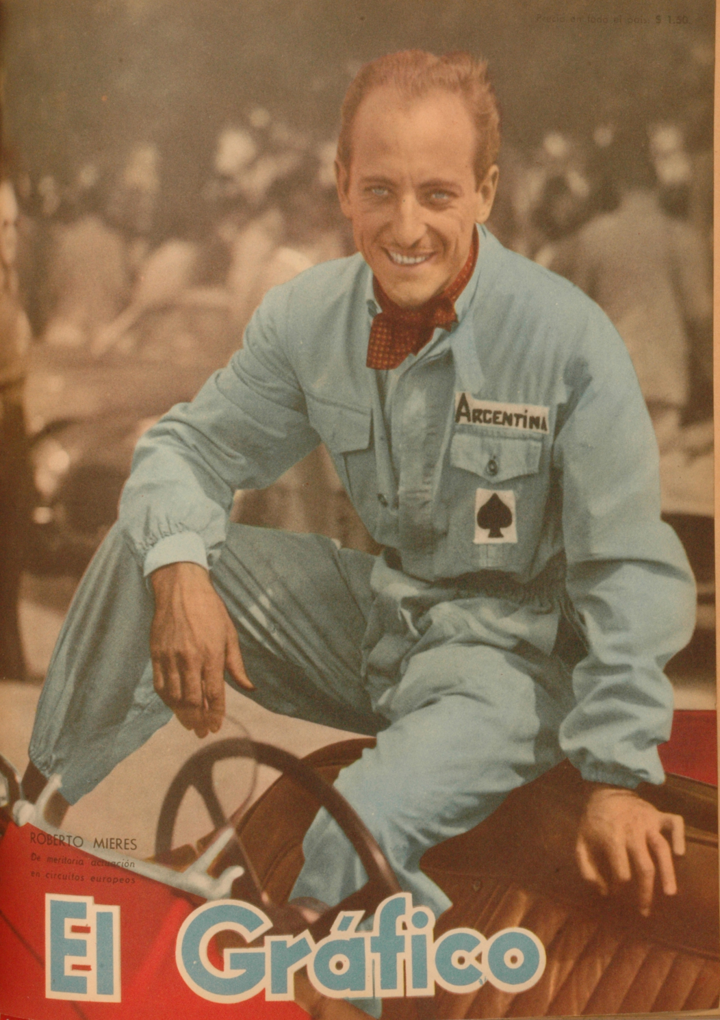 El Grafico del 10 de Julio de 1953. Edicion 1770